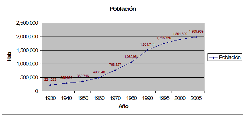 Gráfico de población de Tabasco / Tabasco population